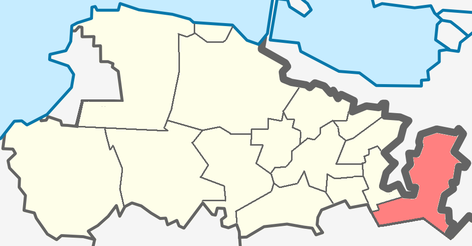 Виллозское сельское поселение Ломоносовского района Ленинградской области.